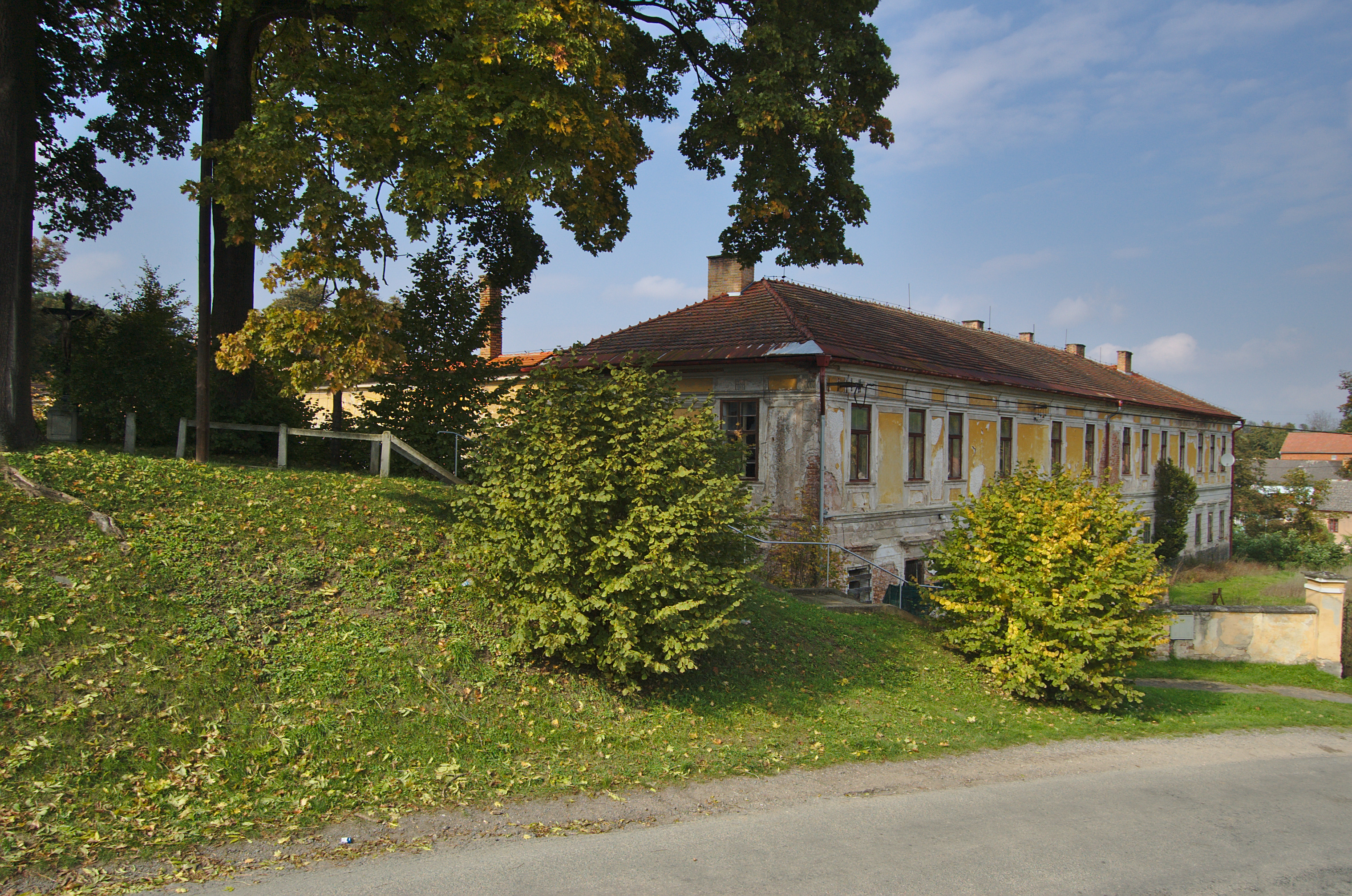 Zámek, Biskupice, okres Svitavy